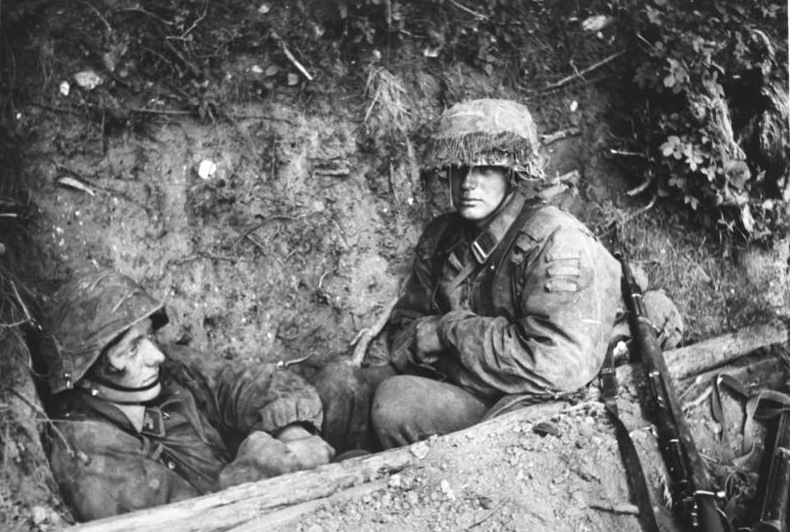 Frankreich Juli 1944 Die SS-Panzergrenadiere kennen die anglo-amerikanischen Tiefflieger und wissen sich gegen ihr MG-Feuer zu schützen. Im schnellen Ausbau von Deckungslöchern sind sie Meister geworden.